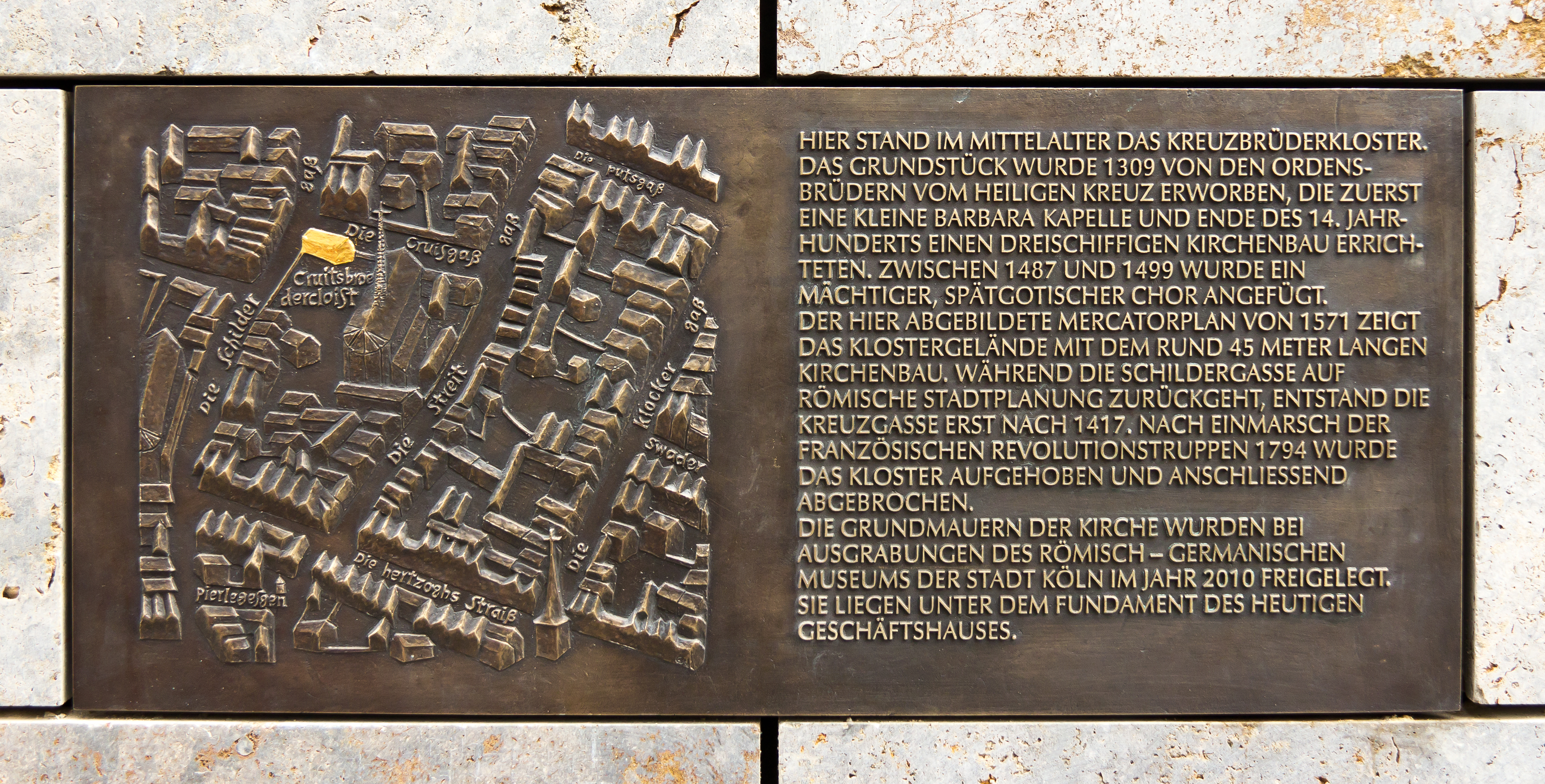 Erinnerungstafel an das Kölner Kreuzbrüderkloster, das nach Einmarsch der französischen Revolutionstruppen 1794 aufgehoben und anschließend abgebrochen wurde. Die Tafel ist an einem 2011 neu errichteten Geschäftshaus Kreuzgasse 2a/Ecke Schildergasse angebracht.